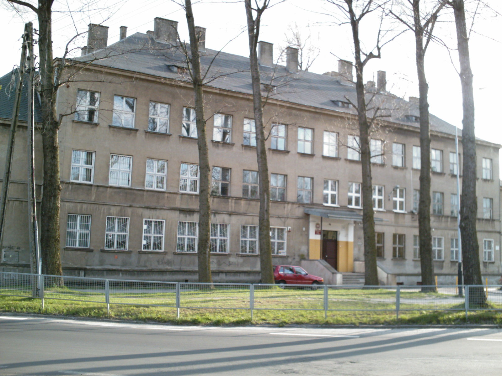 Gimnazjum 33 - School - Poland - Lodz - Janosika Str.